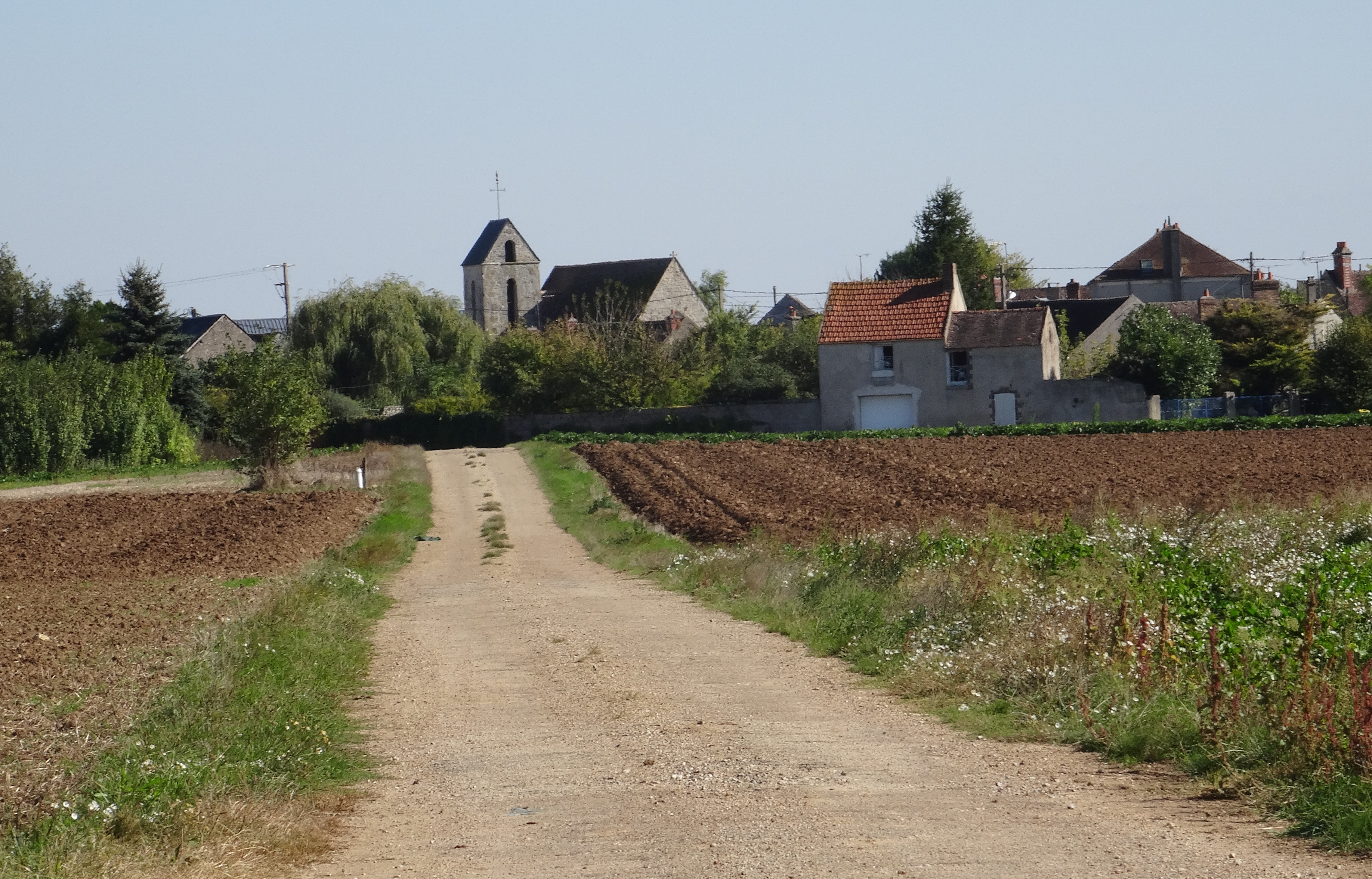 Le village de Maisoncelles-en-Gâtinais. (Seine-et-Marne, région Île-de-France).